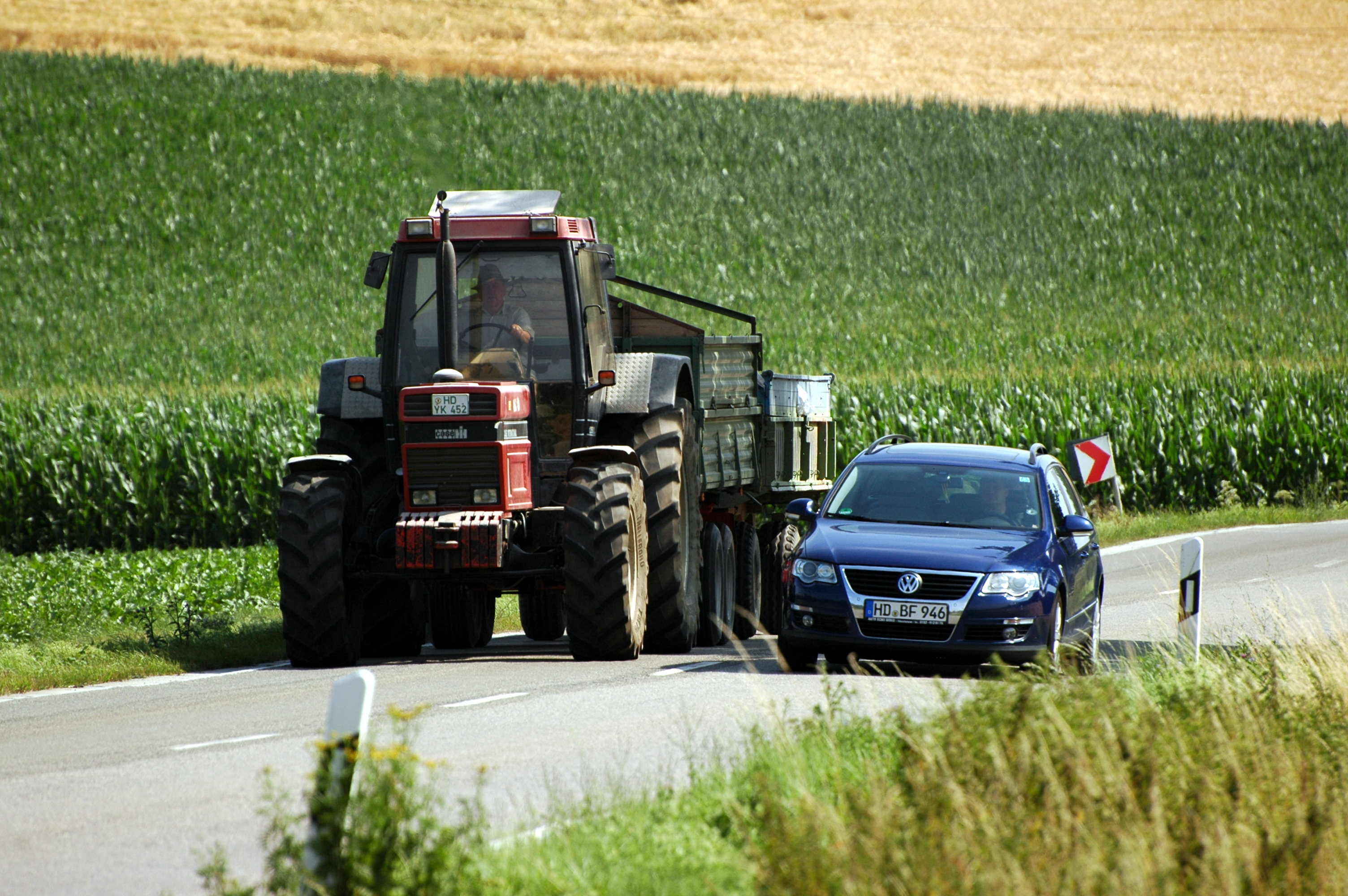 Überholvorgang - Case-IH 1255XL und VW Passat Variant